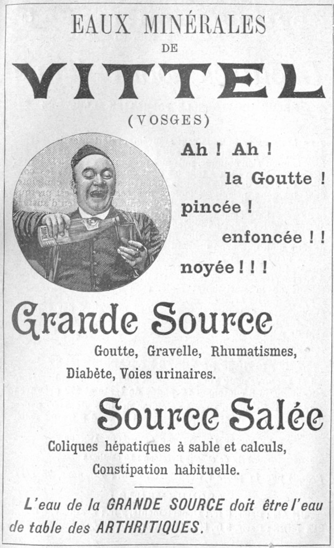 Publicité parue dans le Guide Joanne (1905)